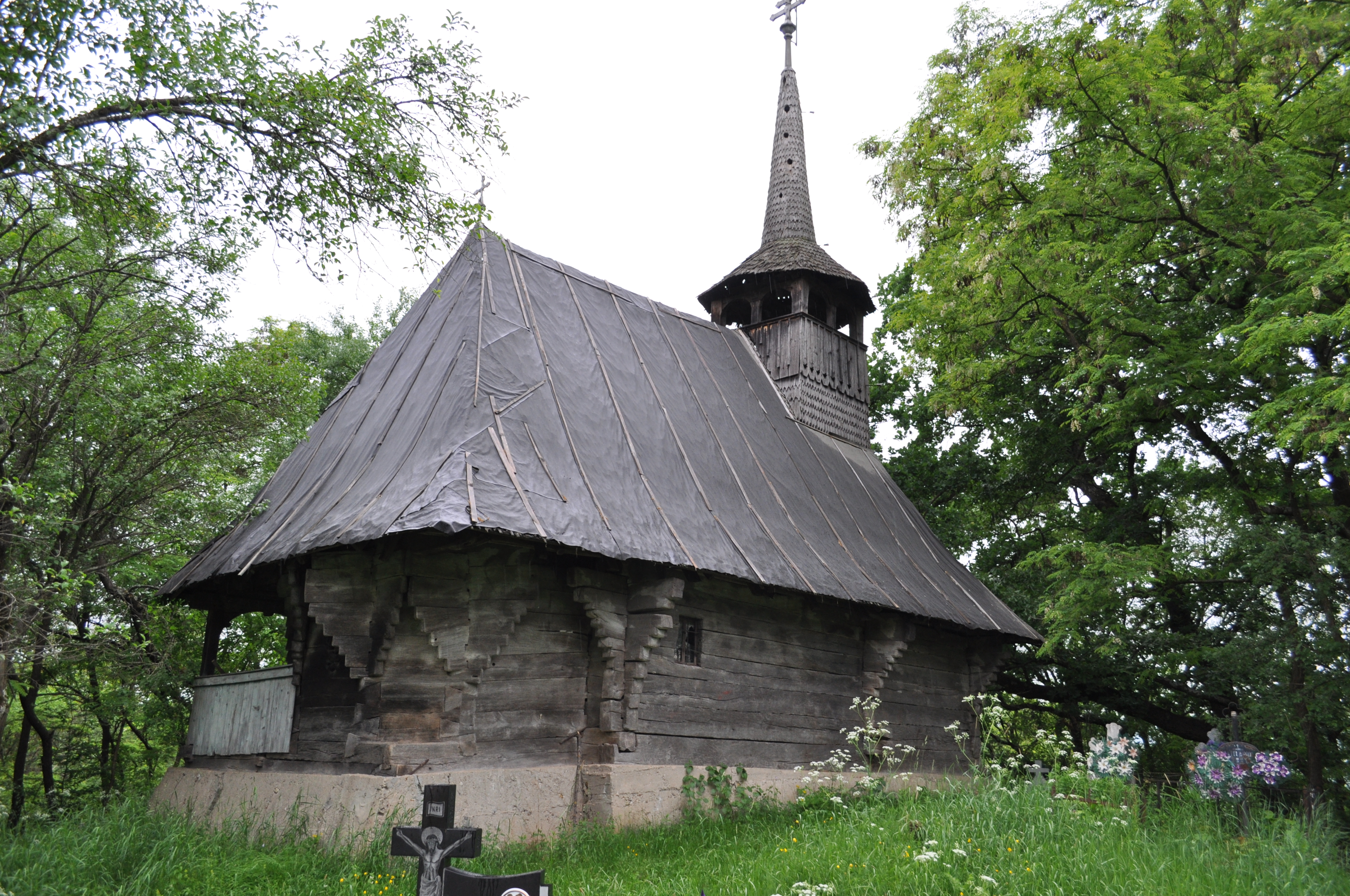 Biserica Sfinţii Arhangheli, Sat Brusturi, Comuna Creaca, județul Sălaj